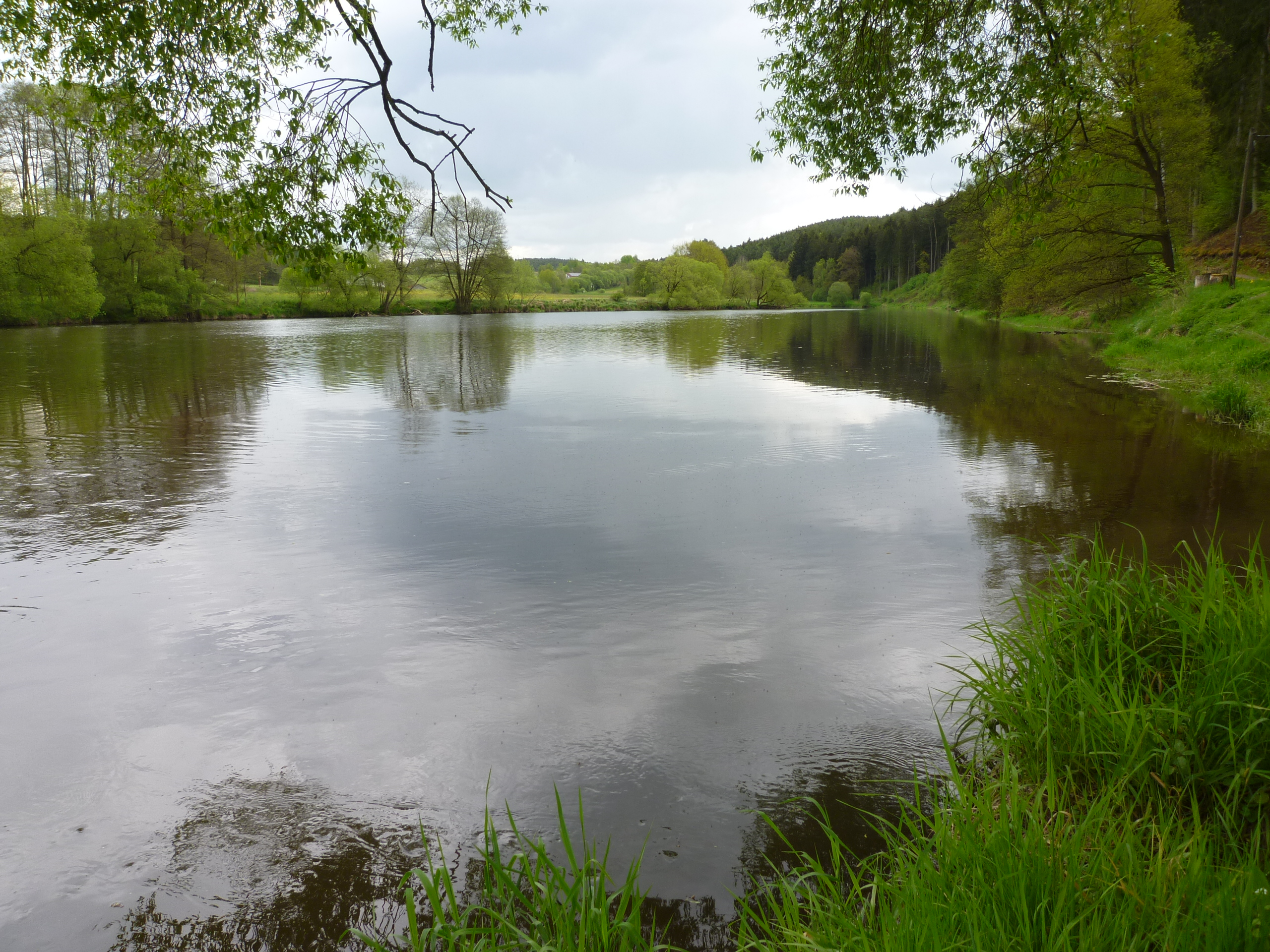 Fluss Regen zwischen den Ortschaften Kirchrohrbach und Zenzing; Naturpark Oberer Bayerischer Wald. Entlang der Regeltalhänge führt ein Wanderweg. Naturschutzgebiet Regentalhänge zwischen Kirchrohrbach und Zenzing.